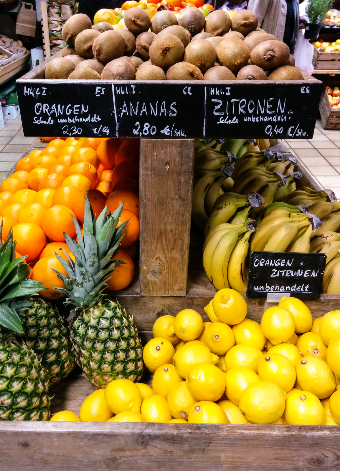 Verkaufsstand mit Südfrüchten (Orangen, Zitronen, Bananen, Kiwi, Ananas)